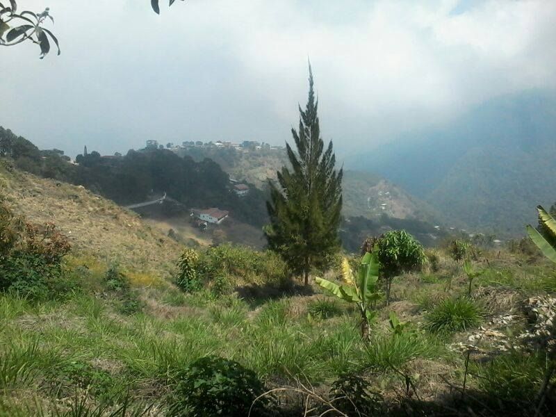 carayaca.